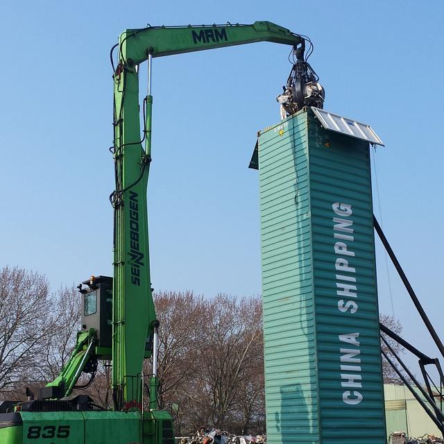 スケールのでかさに度肝を抜かれた。流石はアメリカやな！